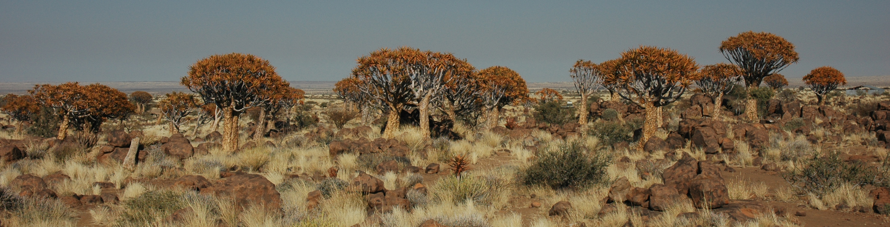 Namibie Quivertree Forest Photographie prise par GIRAUD Patrick